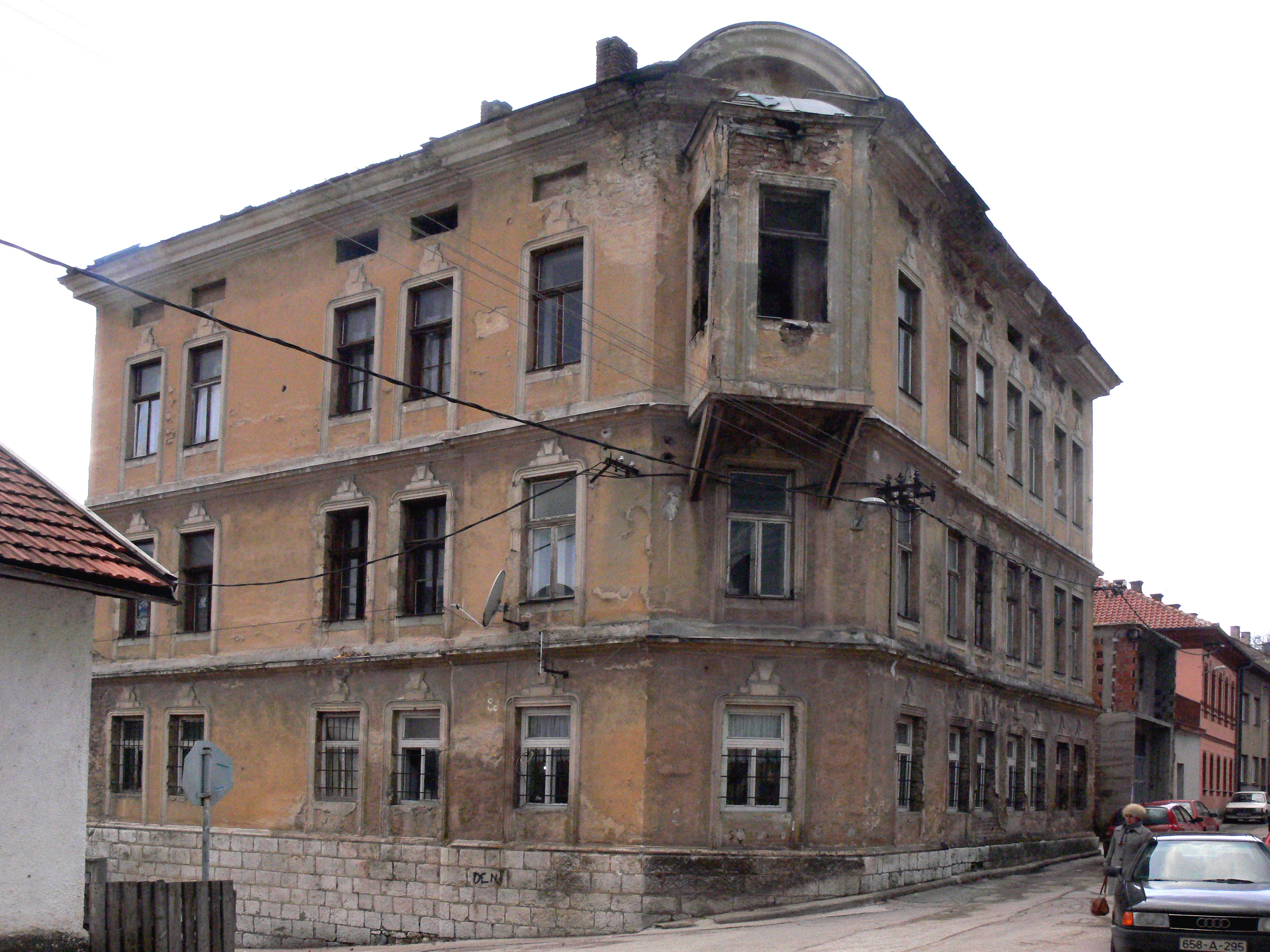 Travnik